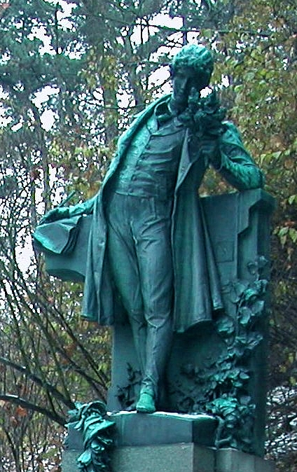 Detalle de la estatua de Karel Hynek Mácha